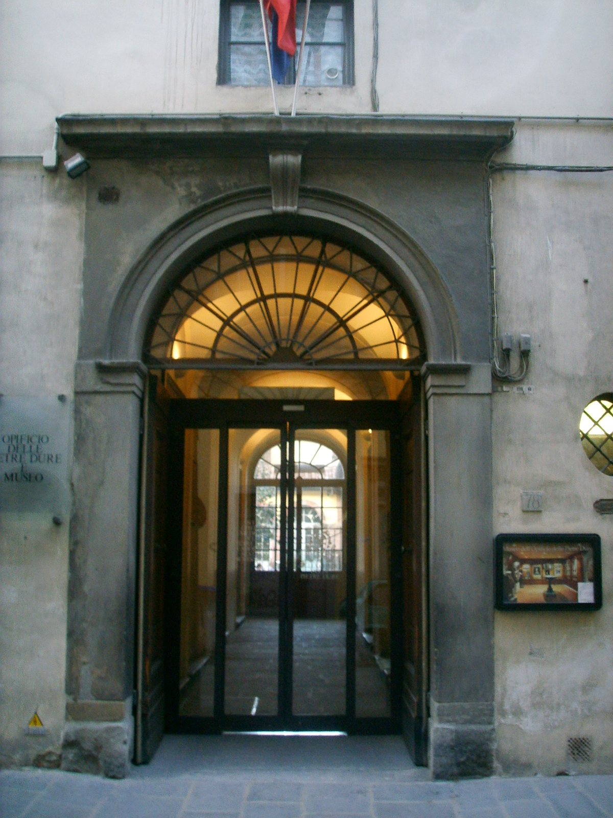 Opificio_delle_pietre_dure,_ingresso